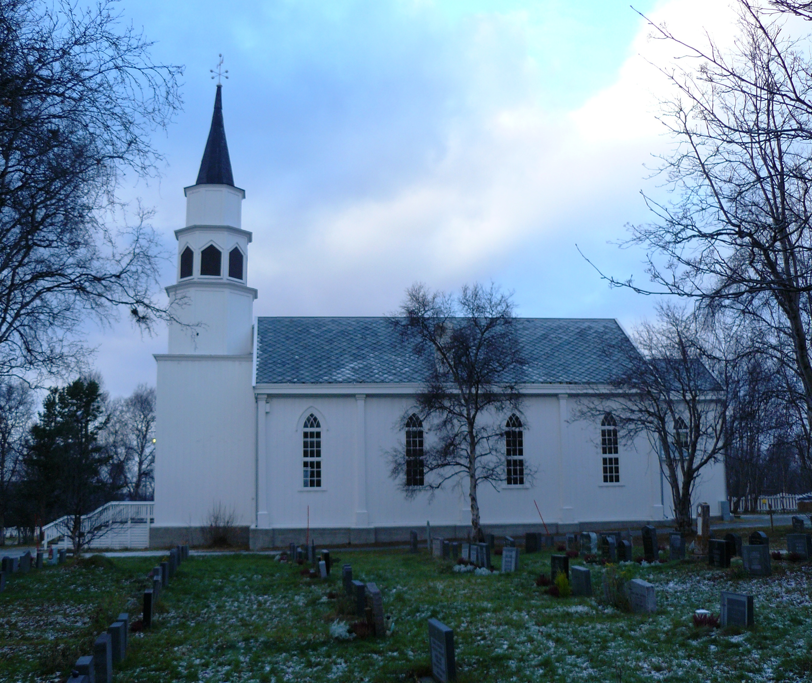 Alta church, Finnmark, Norway